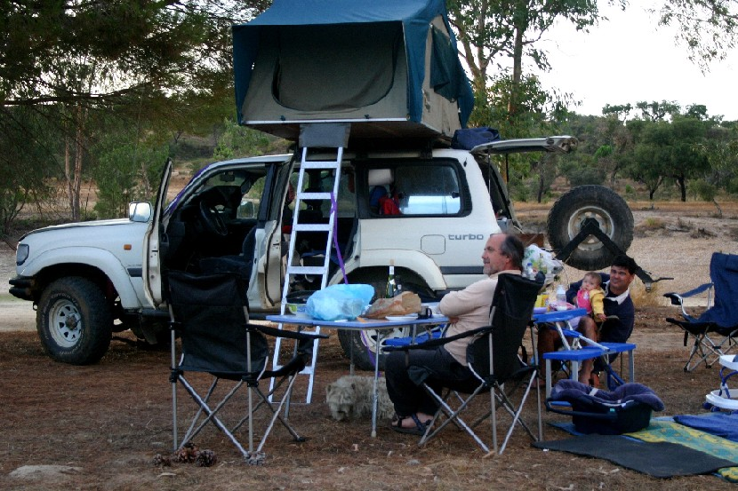 Bivouac familial en 4x4, Portugal, 27 Août 2006